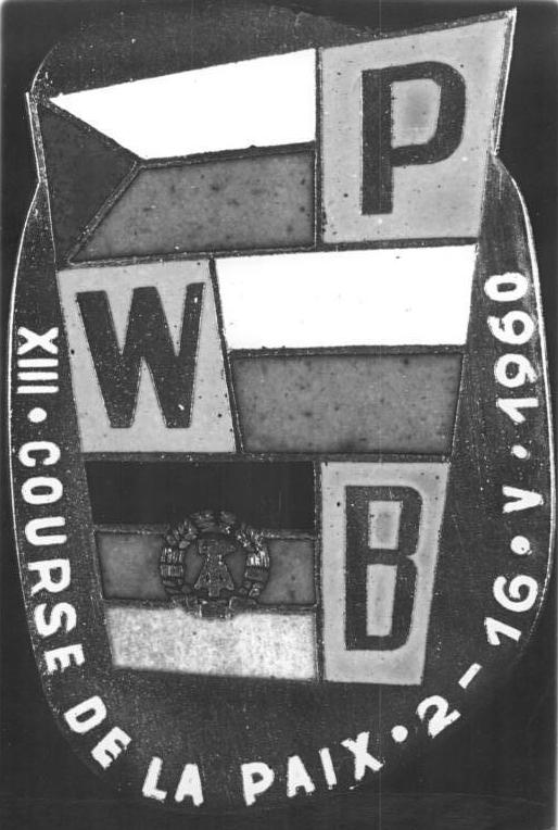 Friedensfahrt, Abzeichen Zentralbild Repre Wan-Fr 28.3.1960 - Abzeichen für die XIII. Internationale Friedensfahrt. Prag-Warschau-Berlin vom 2. bis 16.5.1960.